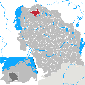 Brüel in Mecklenburg-Vorpommern - District Parchim